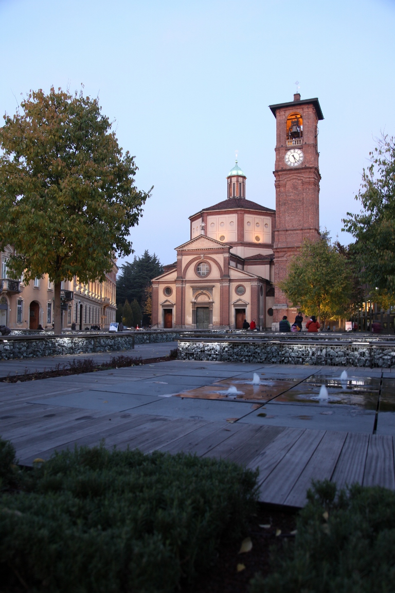 Legnano 11/2010